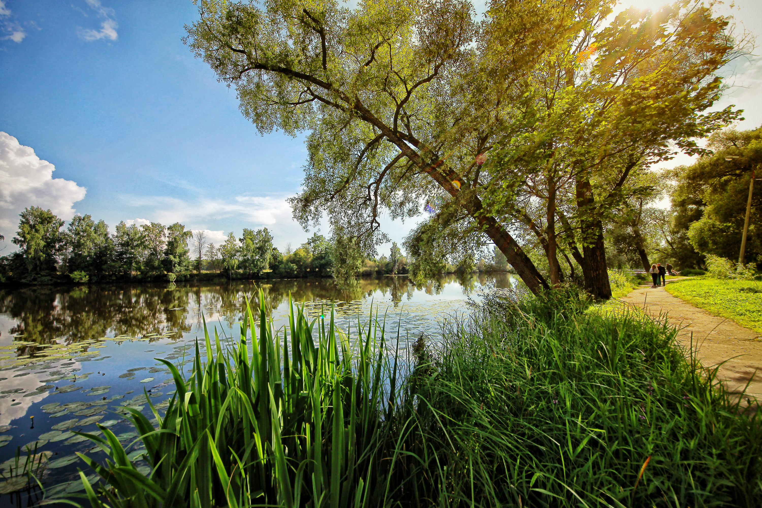 Пруды (два) (Москва и Московская область, Красногорск, село Архангельское)